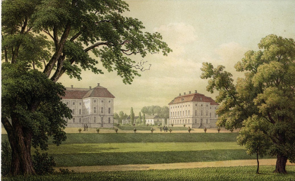 Ekolsunds slott, Enköping. Ur verket "Uplands Herregårdar" med text av Carl Arvid Klingspor och Bernhard Schlegel, utgiven 1881. Teckningar av Alexander Nay (1822-1883).